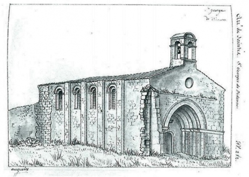 Reproduction d'une gravure de Louis-Benjamin Auguin (1839)